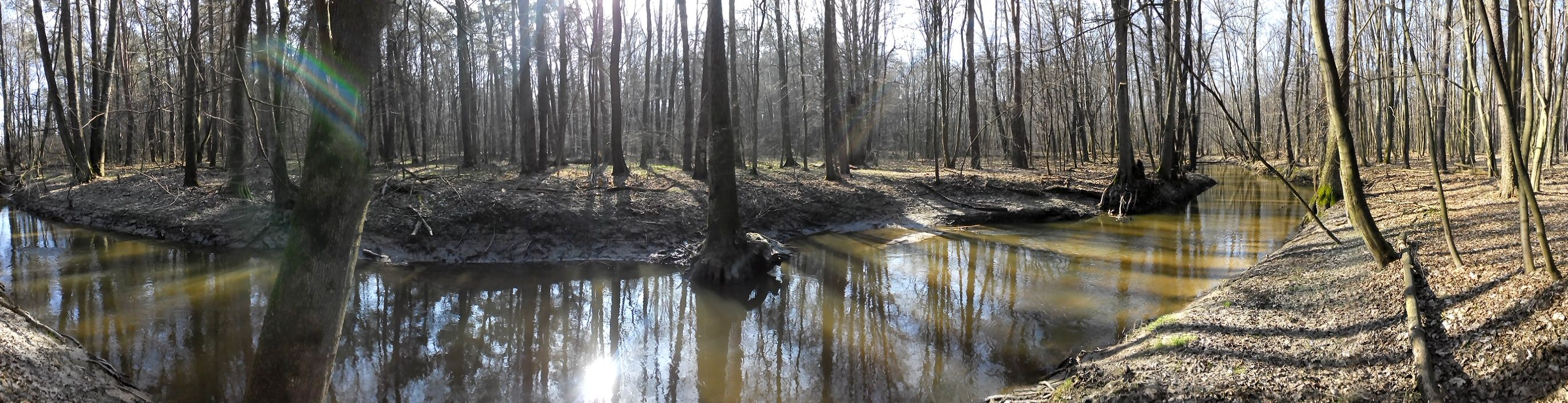 Rzeka Czarna przpływająca przez Rezerwat Przyrody Puszcza Słupecka w gminie Nieporęt.